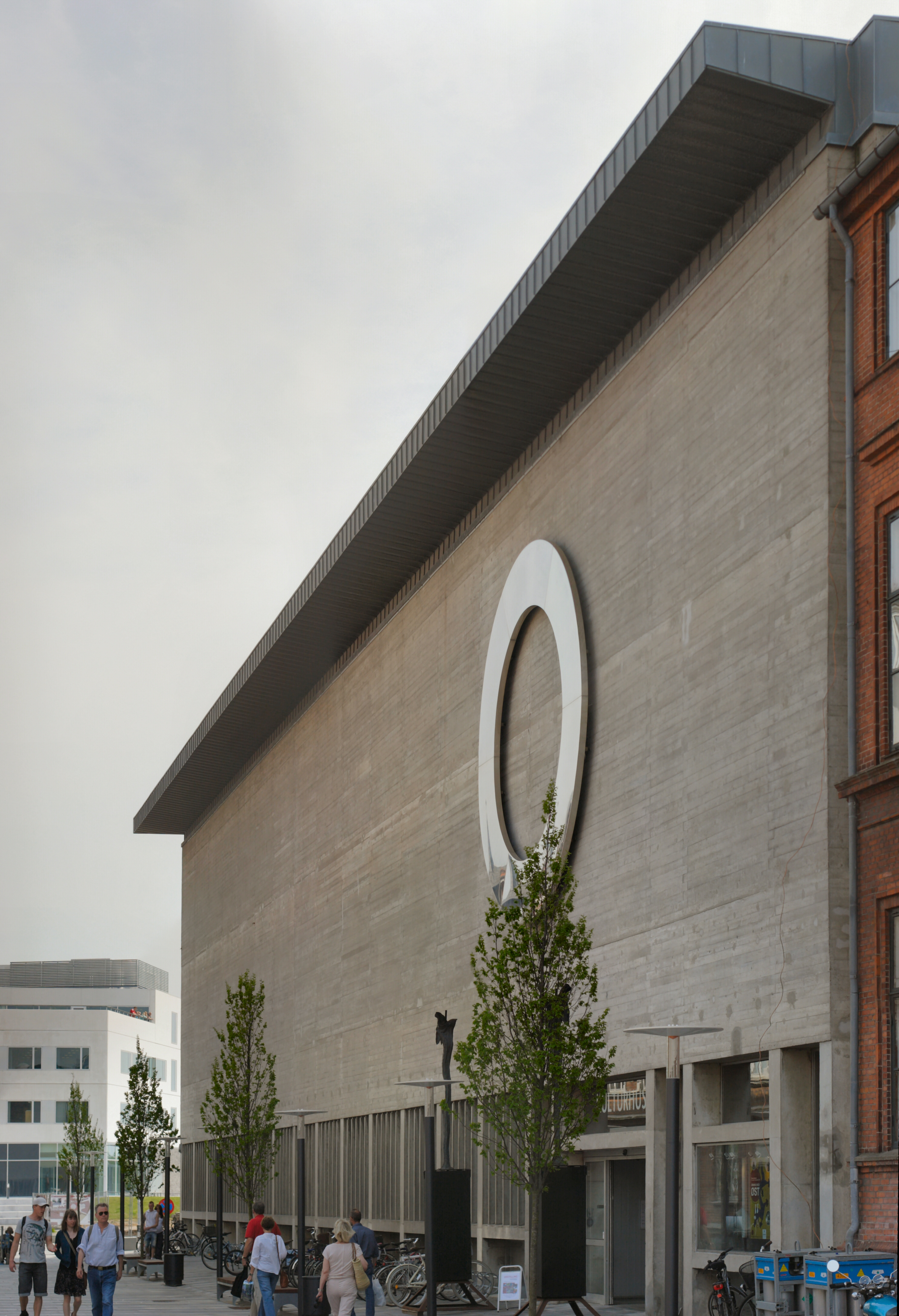 Bygningen hvori Randers Kunstmuseum er placeret